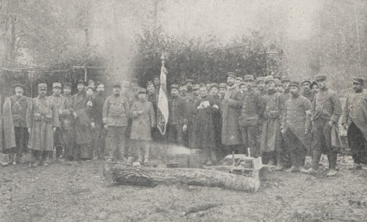 Le Lieutenant-Colonel DULYS, commandant le Régiment, et le Drapeau du Régiment (Argonne, Octobre 1914).